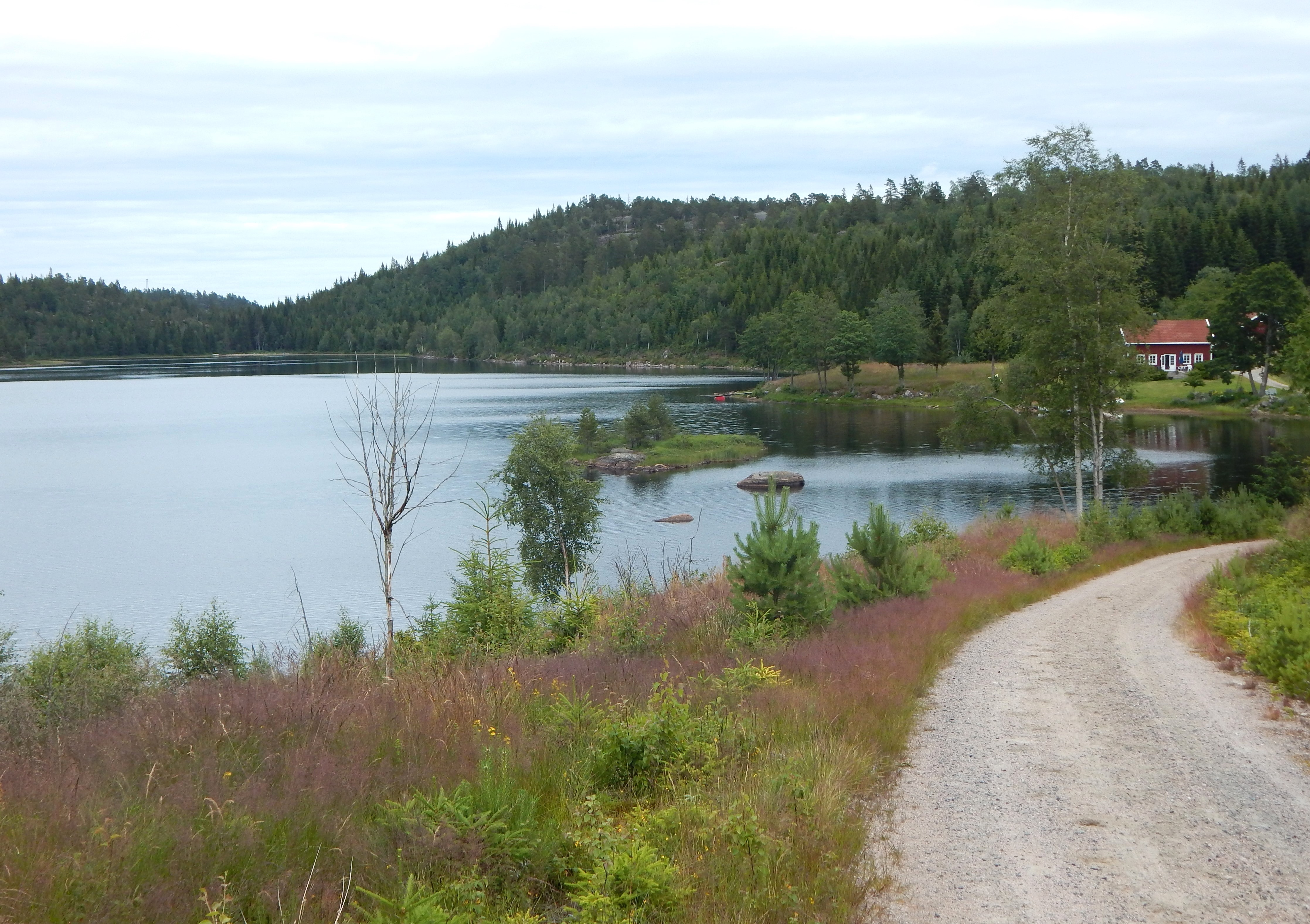 Steinsvannet på grensen mellom Grimstad og Birkenes